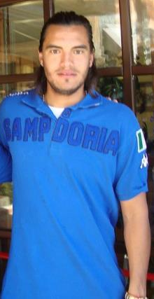 Sergio Romero durante il ritiro della Sampdoria a Bardonecchia.